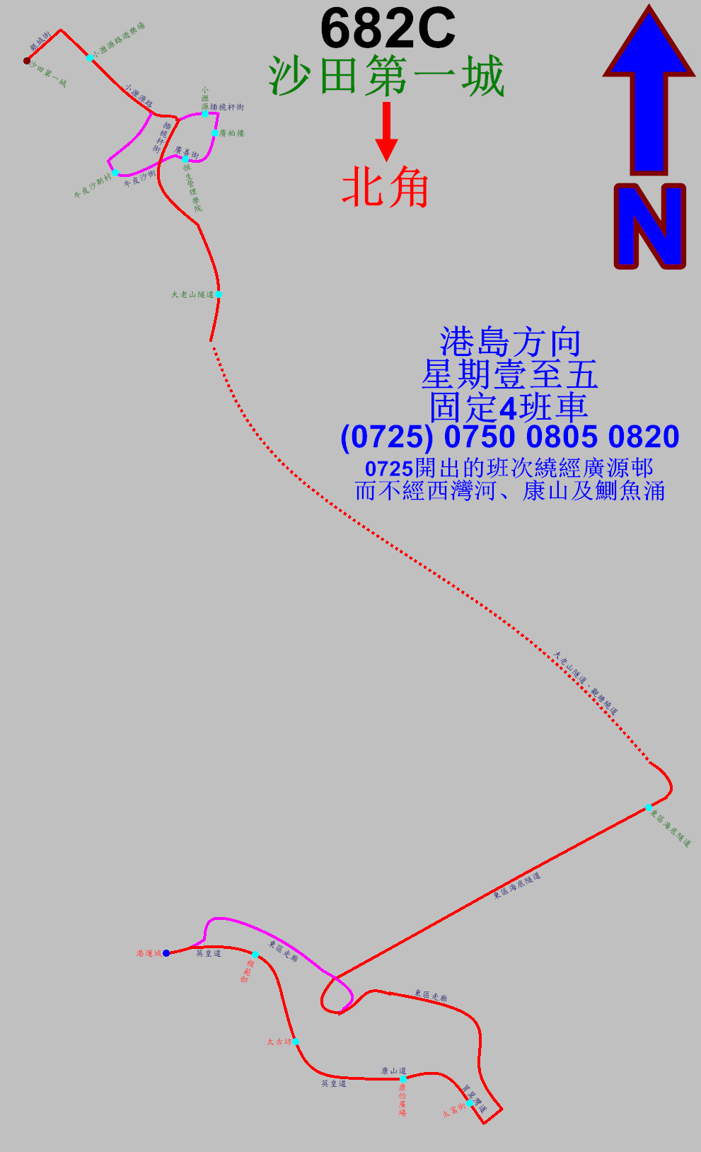 中文（香港）: 過海隧巴682C線北角方向的走線圖